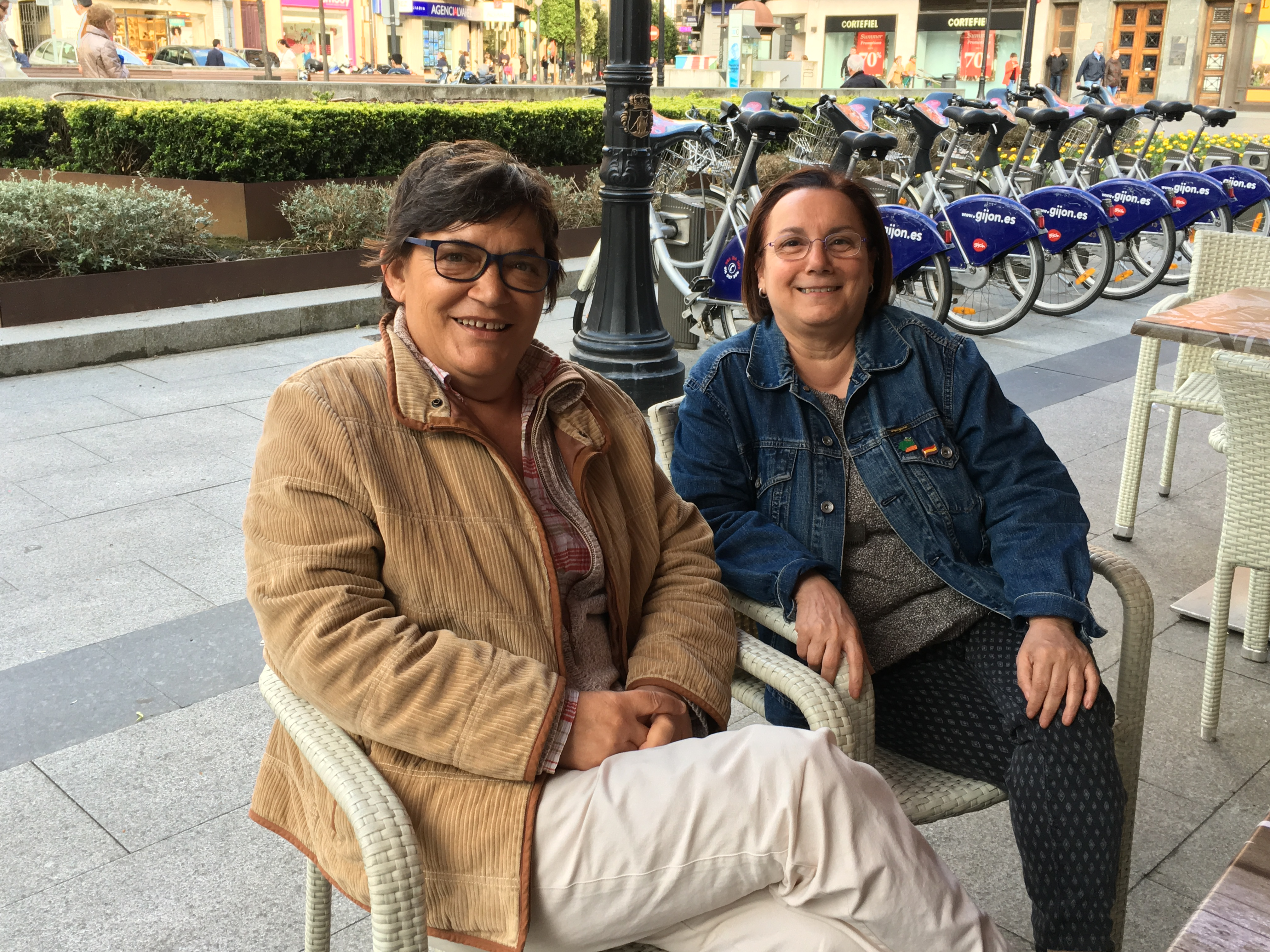 Gijón 2016 en la Escuela Feminista Rosario Acuña